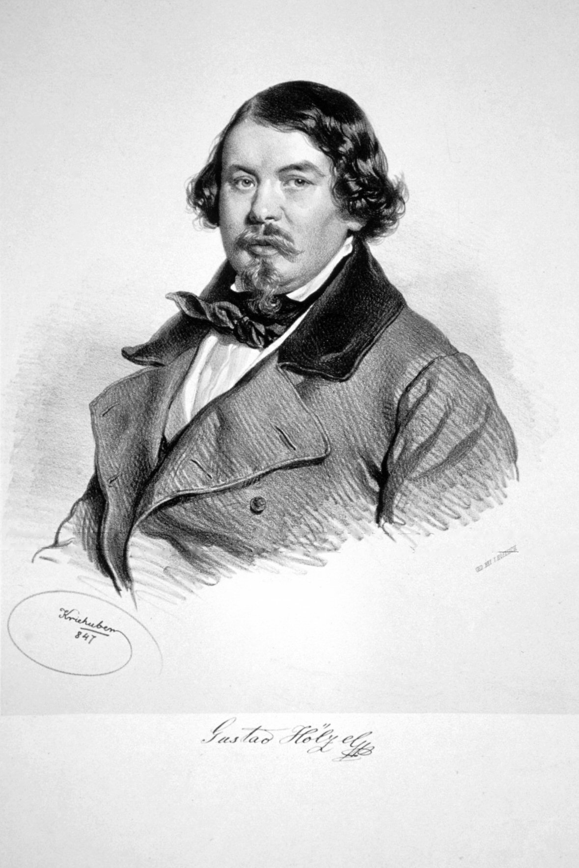 Gustav Hölzel (1813-1883), österreichisch-ungarischer Sänger (Bassbariton), Komponist